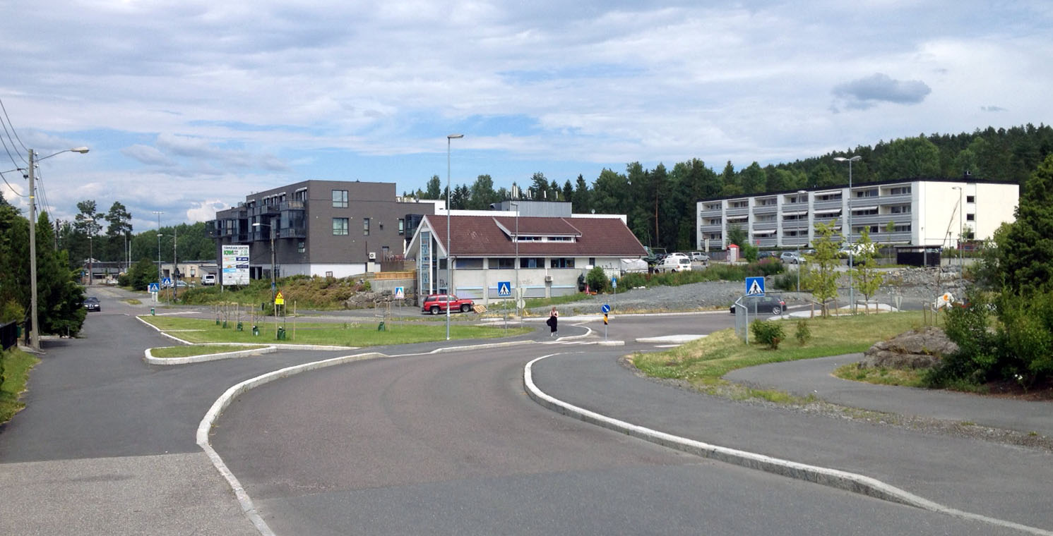 Tårnåsen senter og bebyggelse, Tårnåsen ved Kolbotn, sør for Oslo